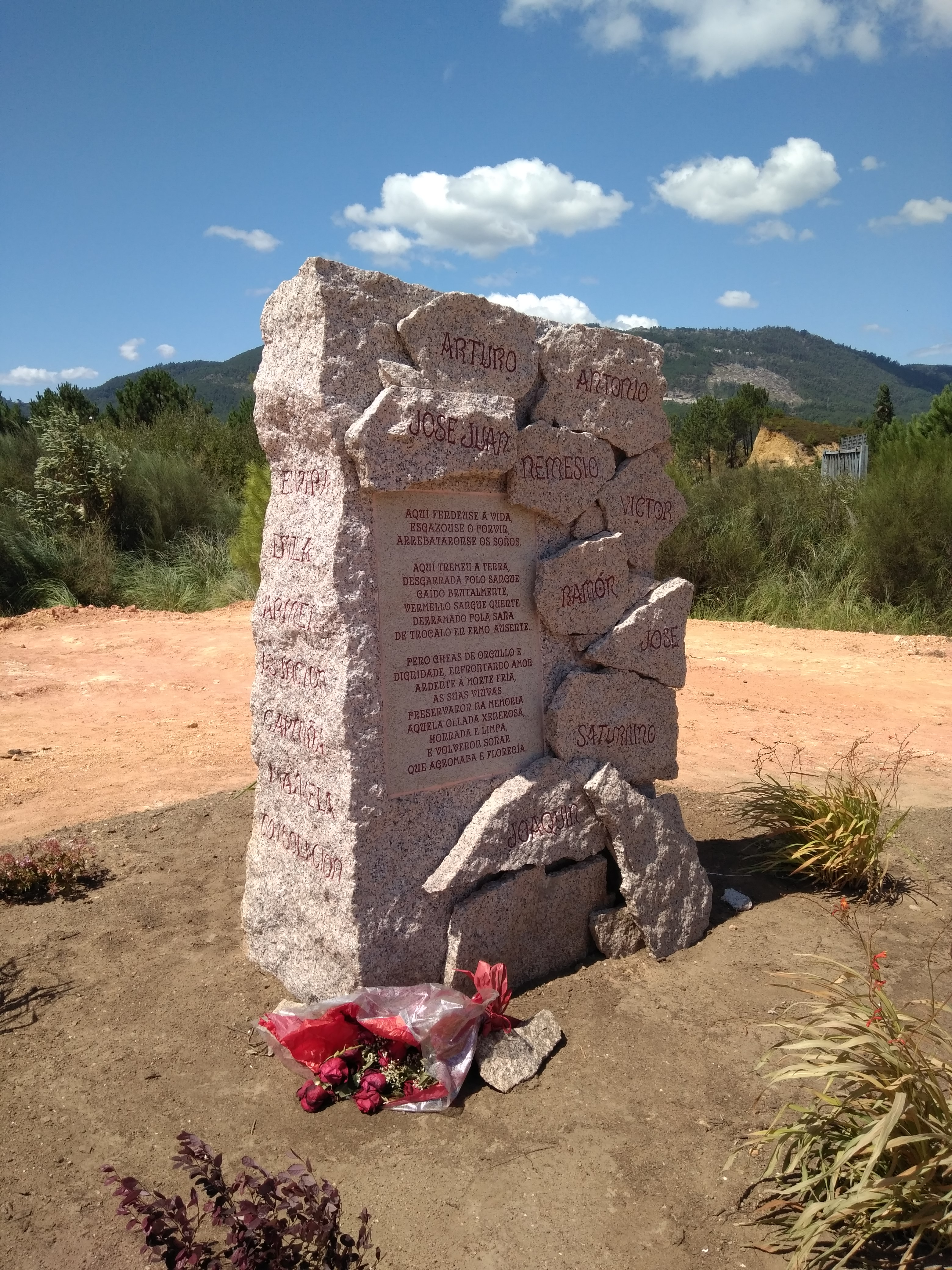 Lugar de memoria ás víctimas do franquismo asasinadas na Volta aos poucos días do levantamento militar fascista de 1936